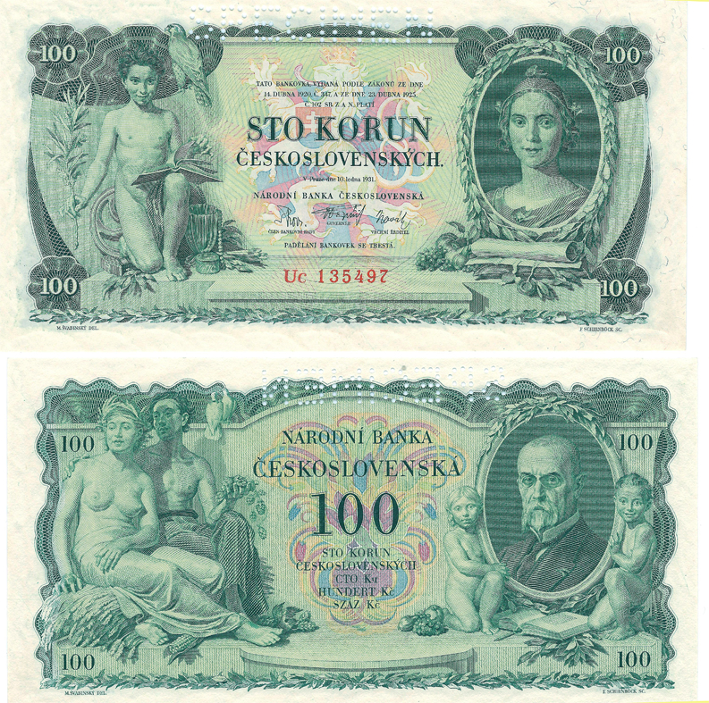 100 korun Česko-Slovenských z roku 1931